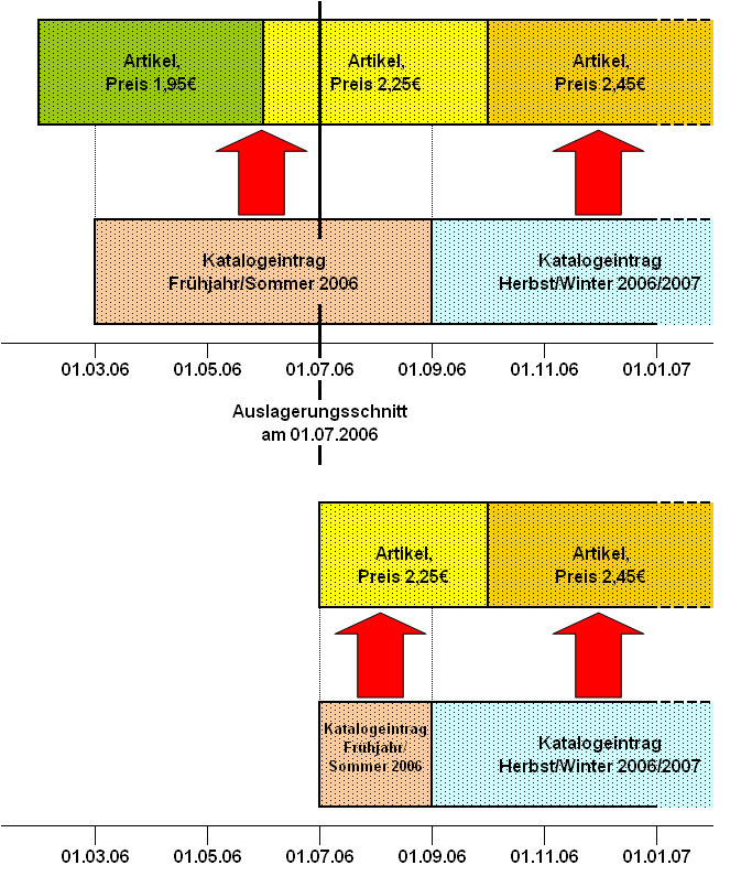 Temporale Datenhaltung, Erläuterung der Zerschneidung bei der Bereinigung bzw. Archivierung.